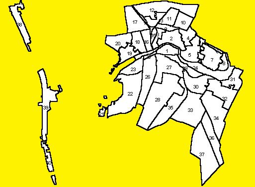 Quartieri di Pisa